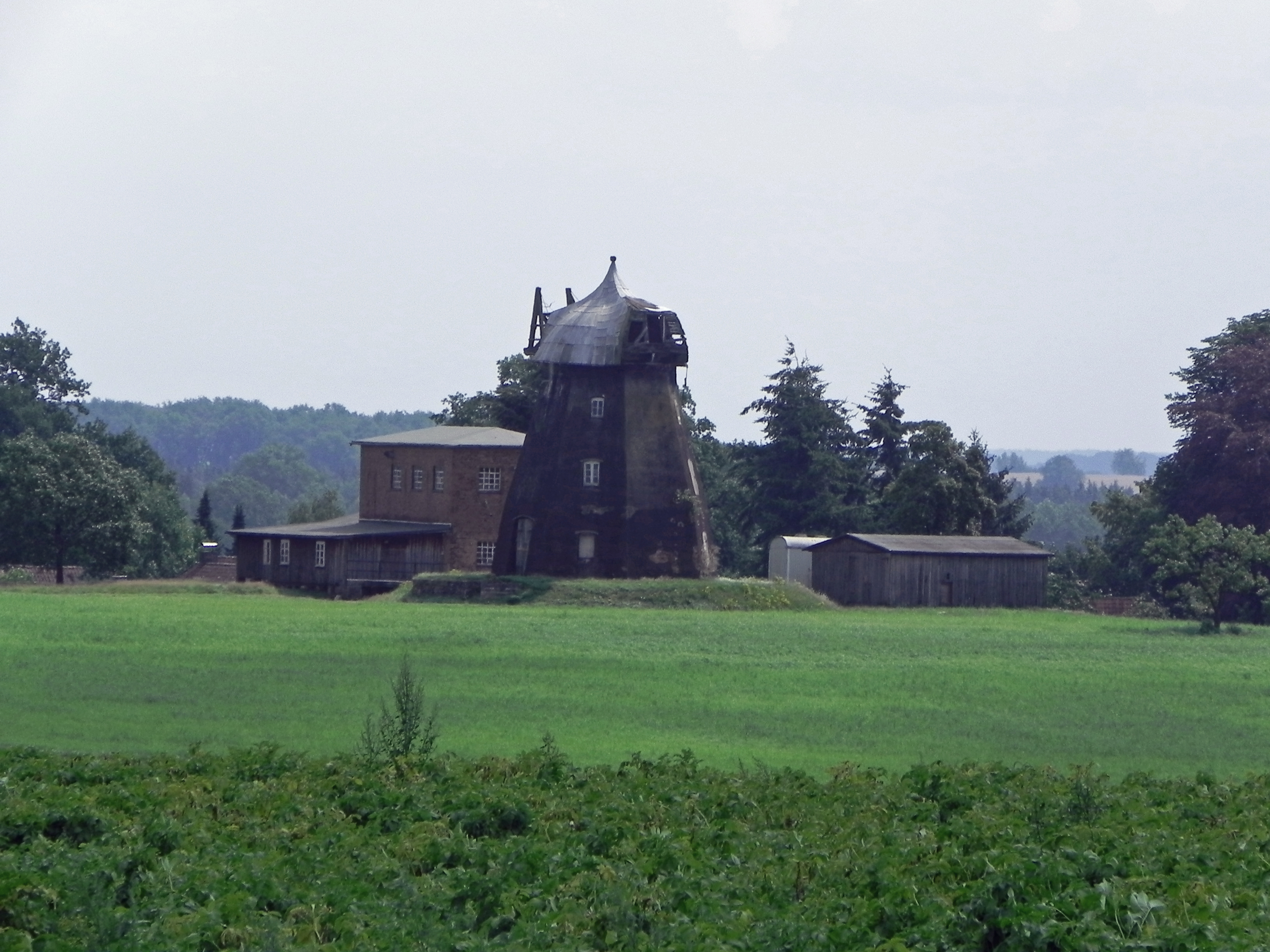 Ehemalige Windmühle in Wardböhmen (Gemeinde Bergen (Celle), Niedersachsen, Germany